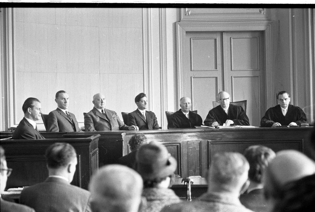 Urteilsverkündung im Schwurgericht Kiel durch Amtsgerichtsdirektor Jensen (6.v.l.) in Anwesenheit der Beisitzer Landgerichtsrat Langrehr (5.v.l.) und Landgerichtsrat Johannes Reimer (7.v.l.) Im Bild links auf der Anklagebank Hans Graalfs (1.v.l.).